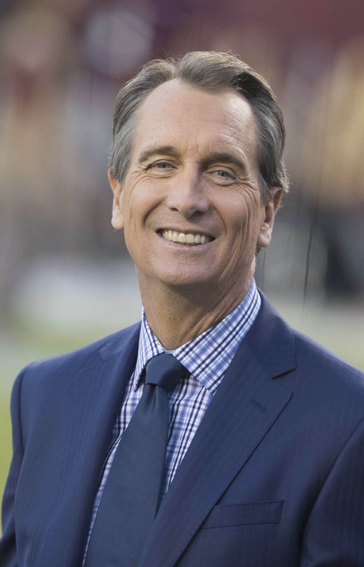 Raiders at Redskins 9/24/17